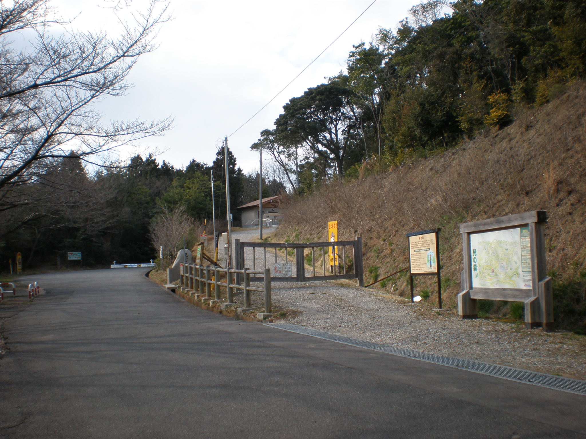 愛知県小牧市にある兒の森入り口。